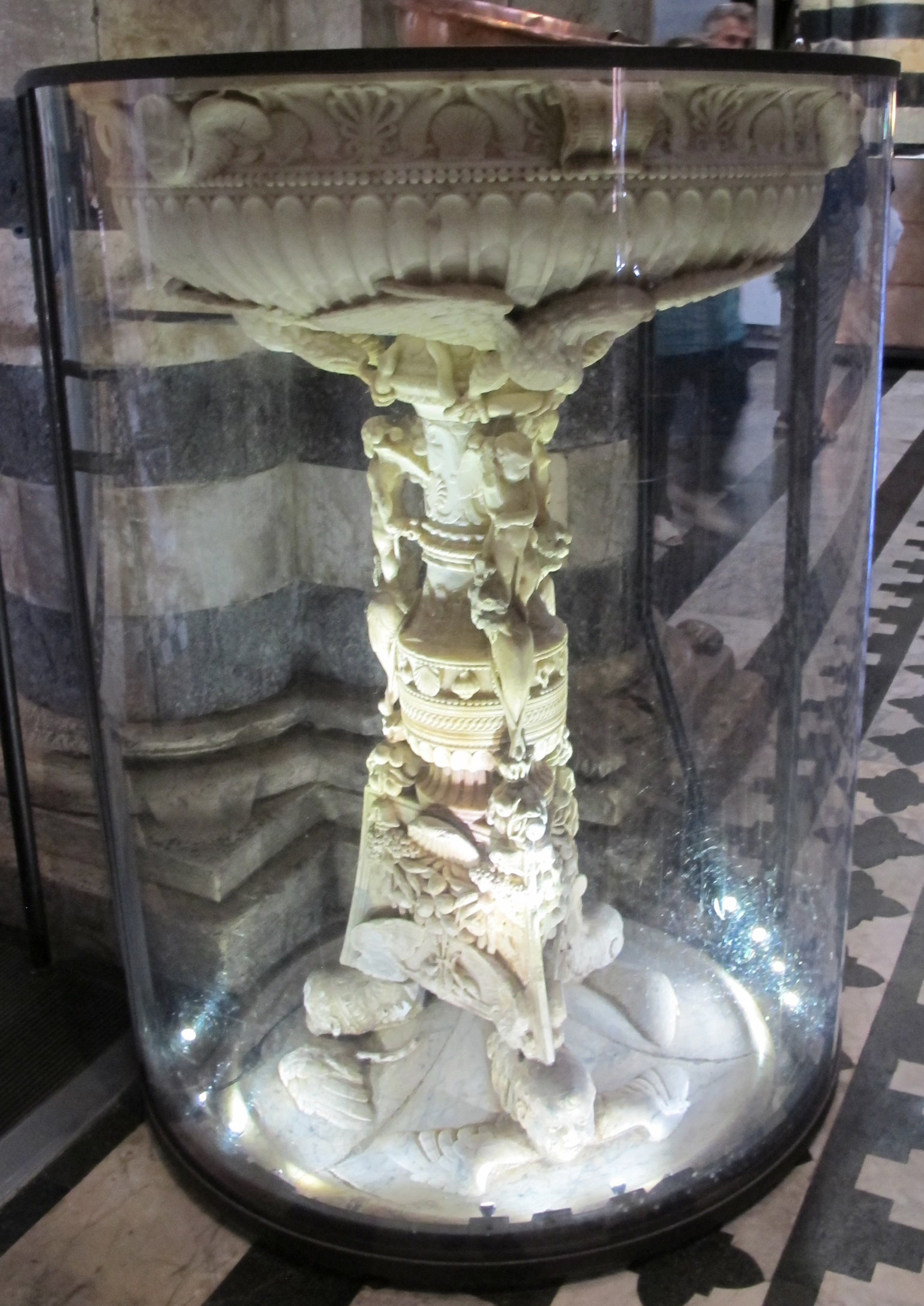 Acquasantiera del duomo di siena, di antonio federighi